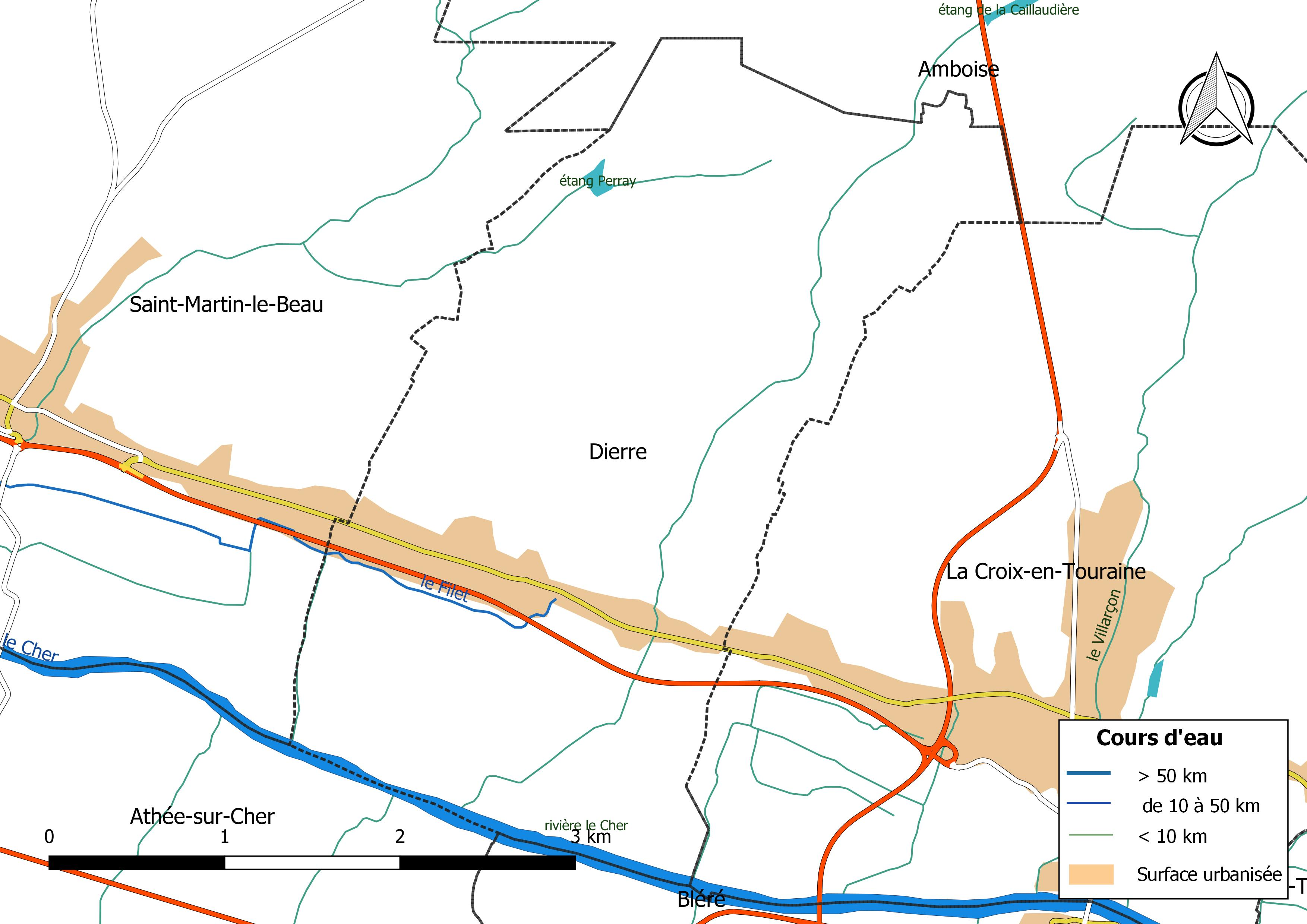 Carte du réseau hydrographique de la commune de Dierre (France).